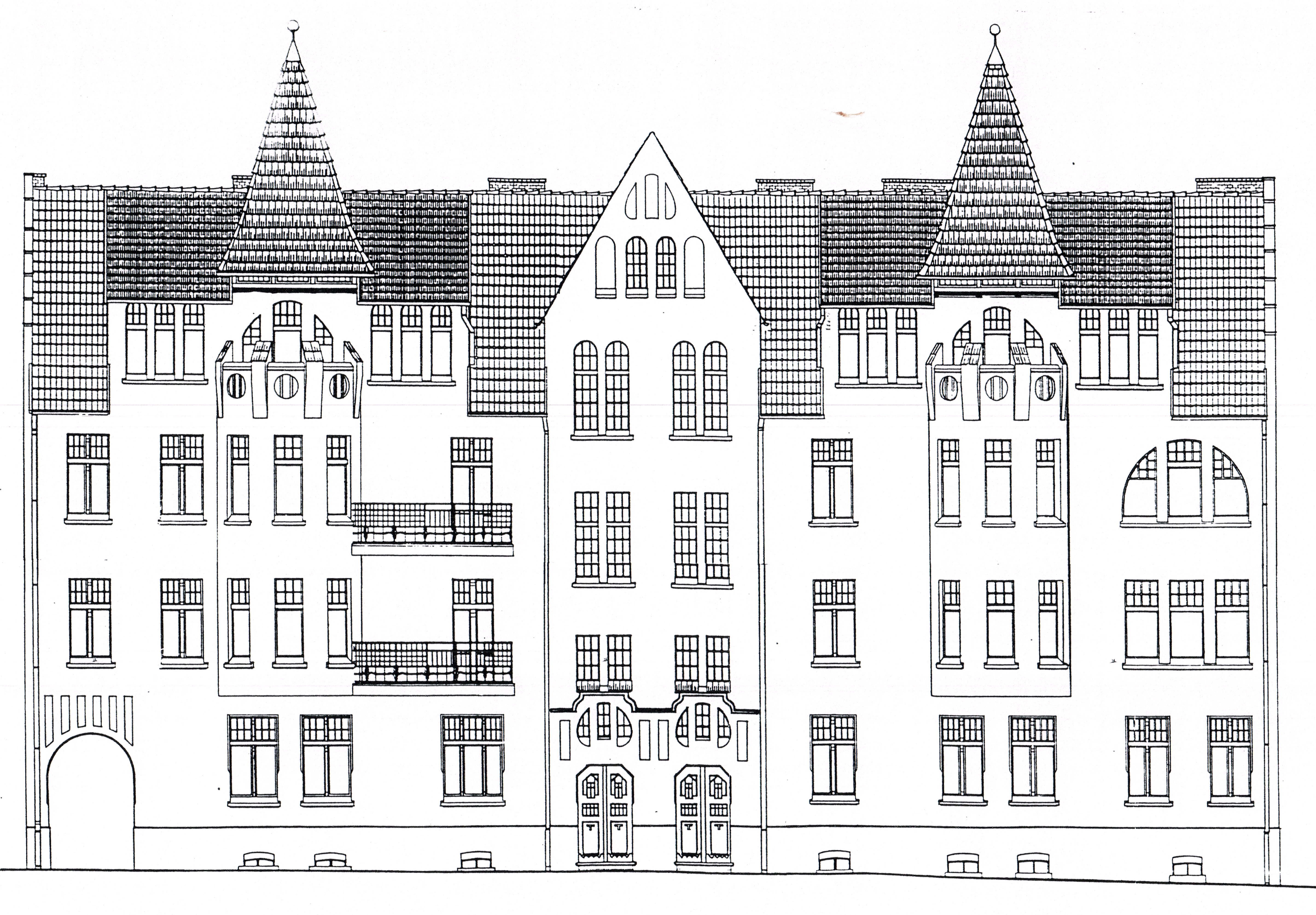 Rysunek z projektu adaptacji kamienic na hotel "Stary Malbork"